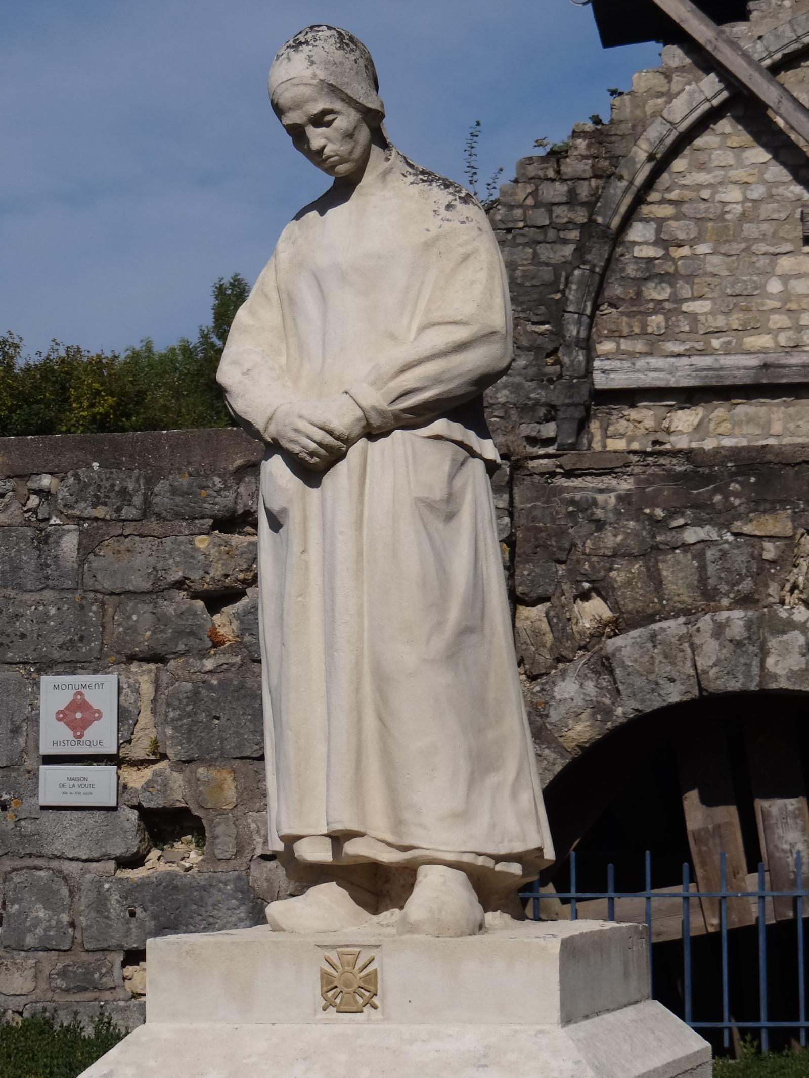 Hattonchatel-Ernest-Nivet Monument aux morts